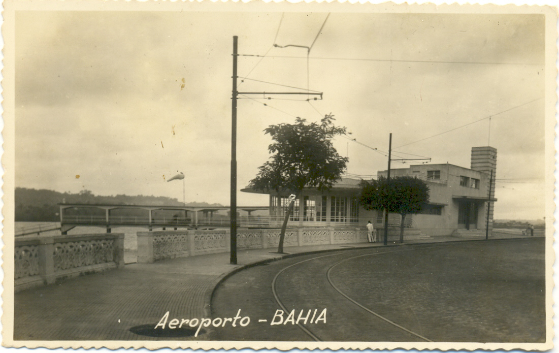 Pier da Ribeira de Itapagipe, na Enseada dos Tainheiros, em Salvador, Bahia, Brasil.